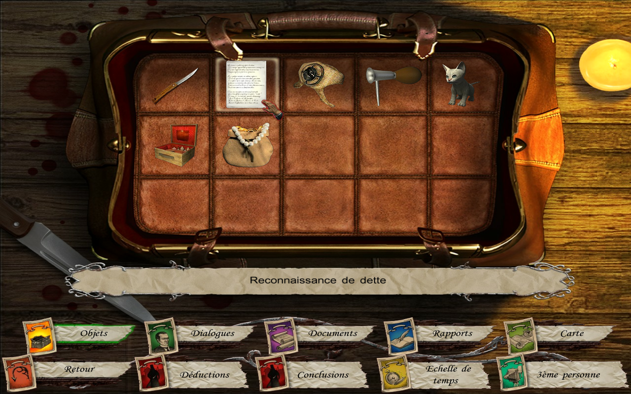 Capture d'écran du jeu Sherlock Holmes contre Jack l'Éventreur. Il s'agit ici de l'inventaire du joueur, un élément typique du jeu d'aventure en général.